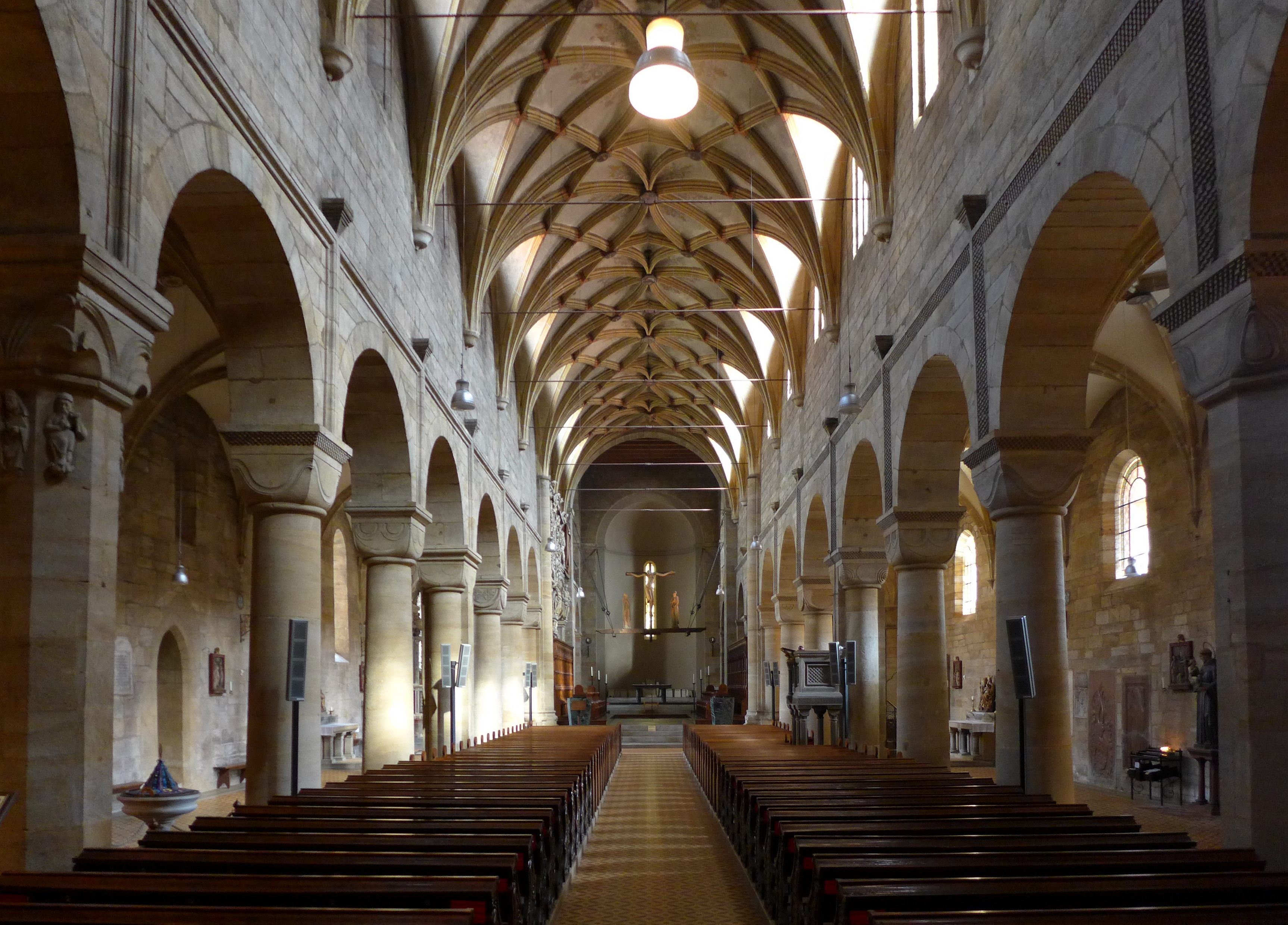 Basilika Seckau - Innenraum 2